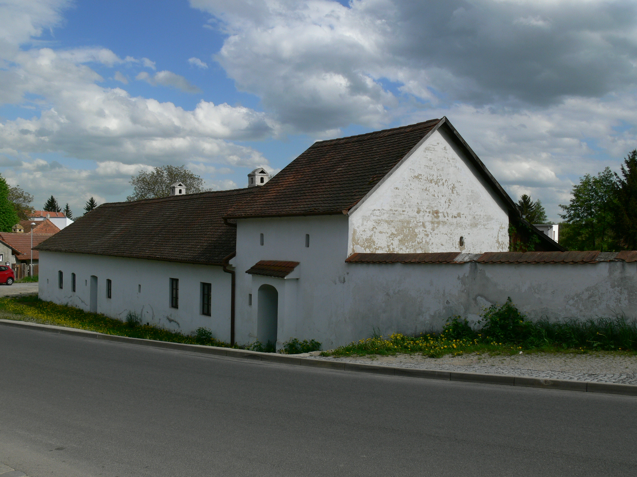 Dědice, Revoluční, tzv. rodný domek Klementa Gottwalda